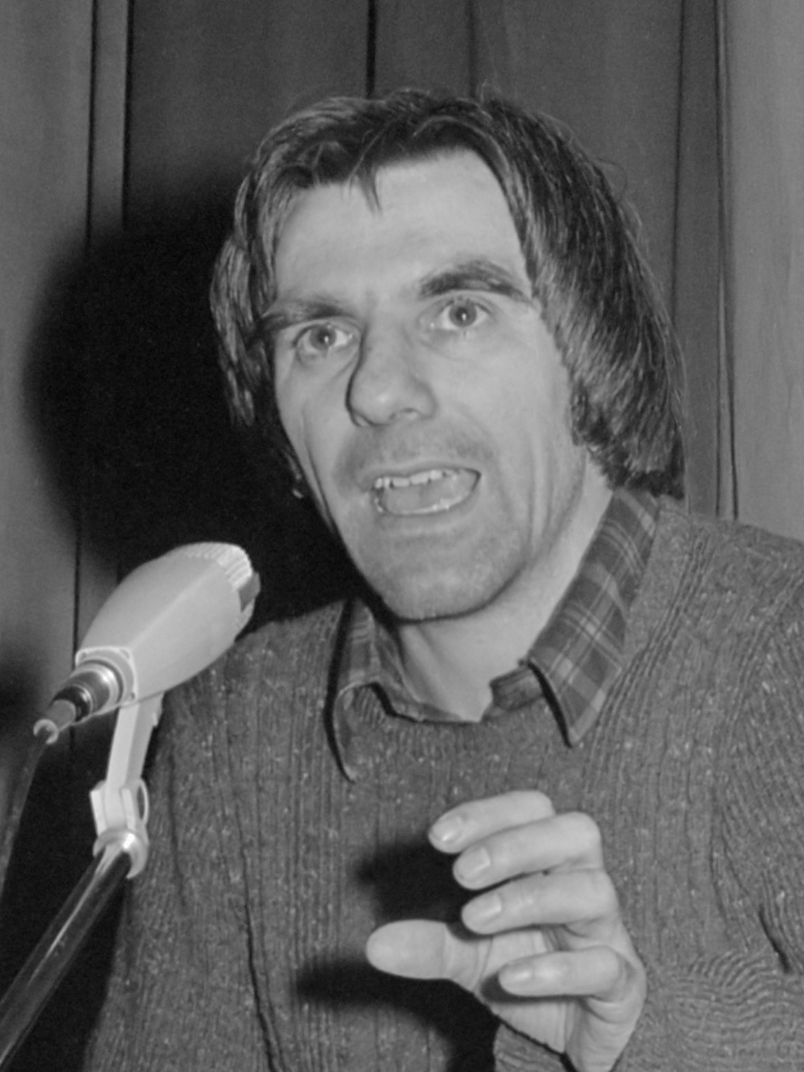 Voormalige Westduitse studentenleider Rudie Dutschke, geeft lezing op de Katholieke Hogeschool te Tilburg 12 februari 1976